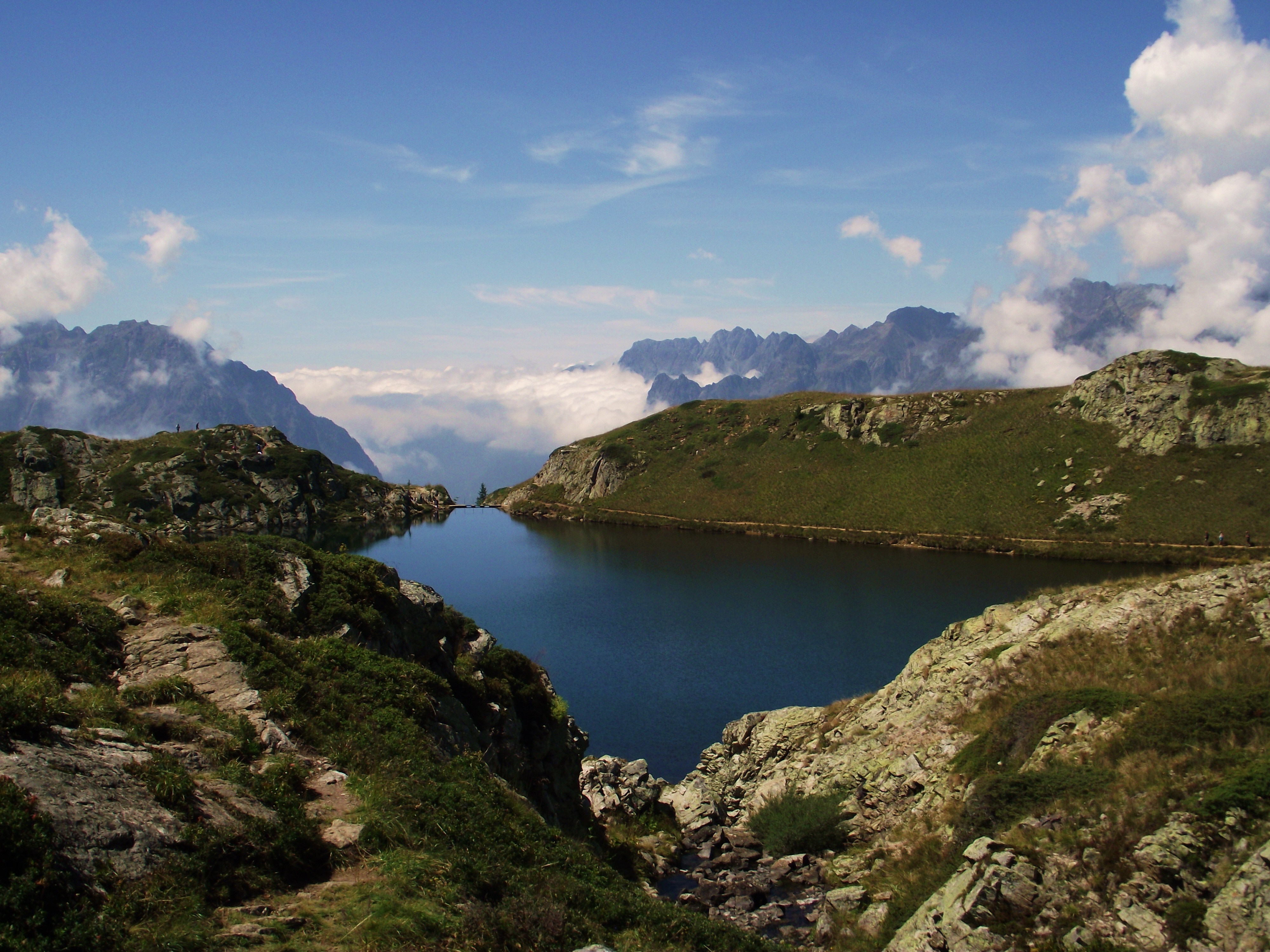 Vue du parc des écrins (2)